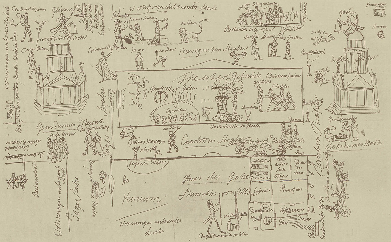 Der sogenannte Kunzsche Riss, den E. T. A. Hoffmann nach seinem Umzug nach Berlin an seinen Bamberger Verleger Kunz schickte. Gesamtansicht